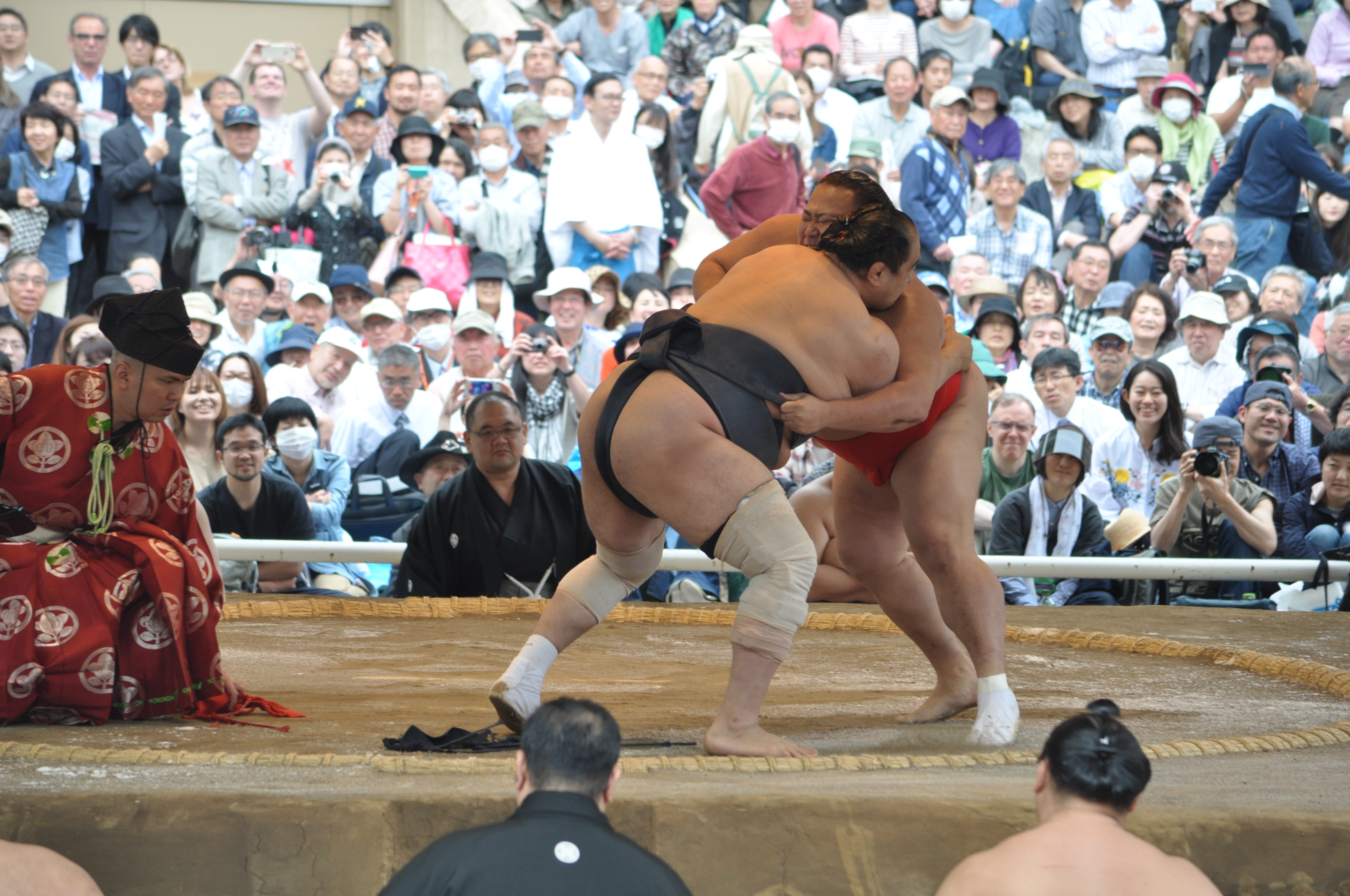 旭日松 広大